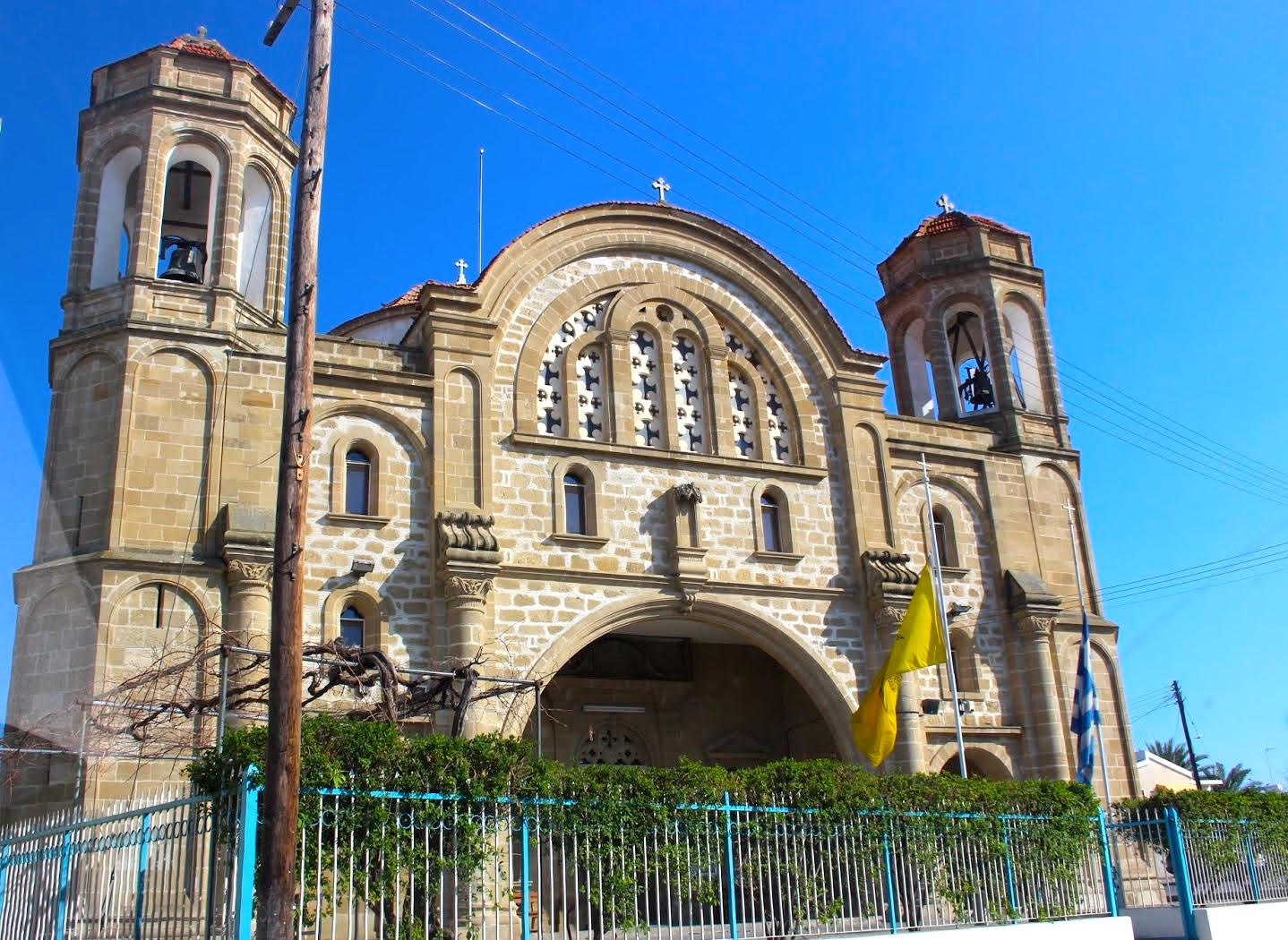 Ekklisia lusi